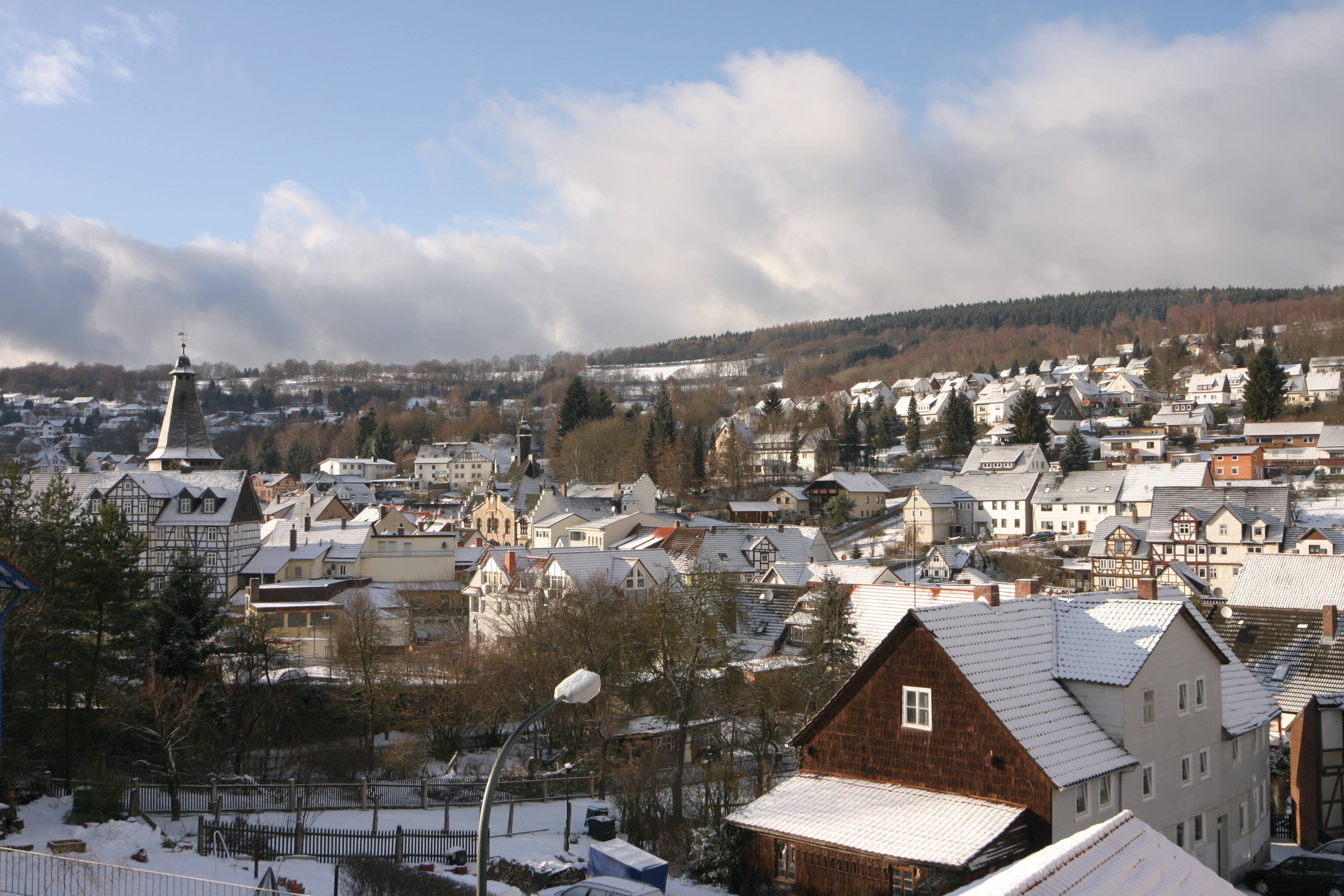 Ansicht von Großalmerode Richtung NW